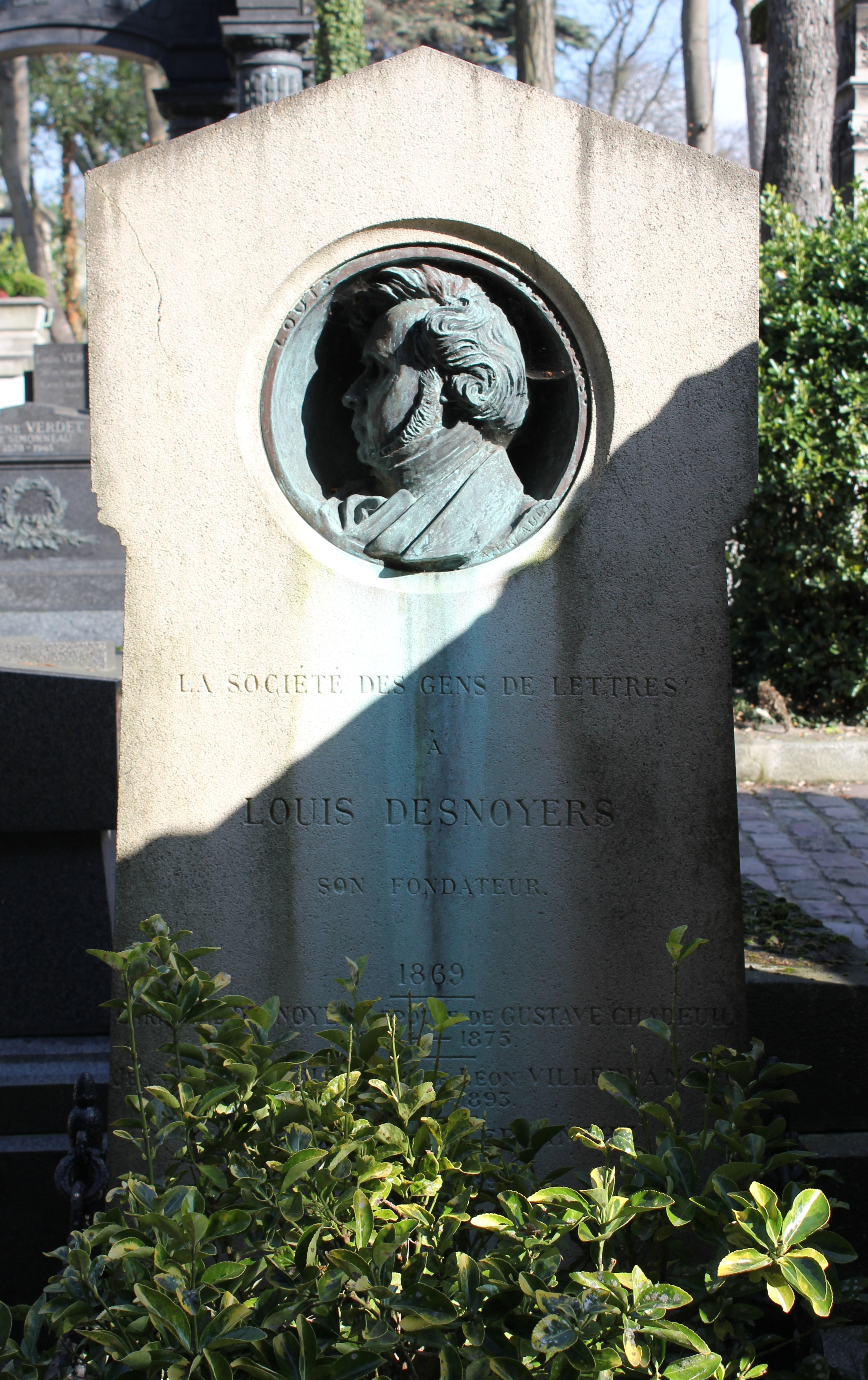 Monument orné d'un médaillon en bronze réalisé par Auguste Préault. Le monument fut érigé par la Société des gens de lettres